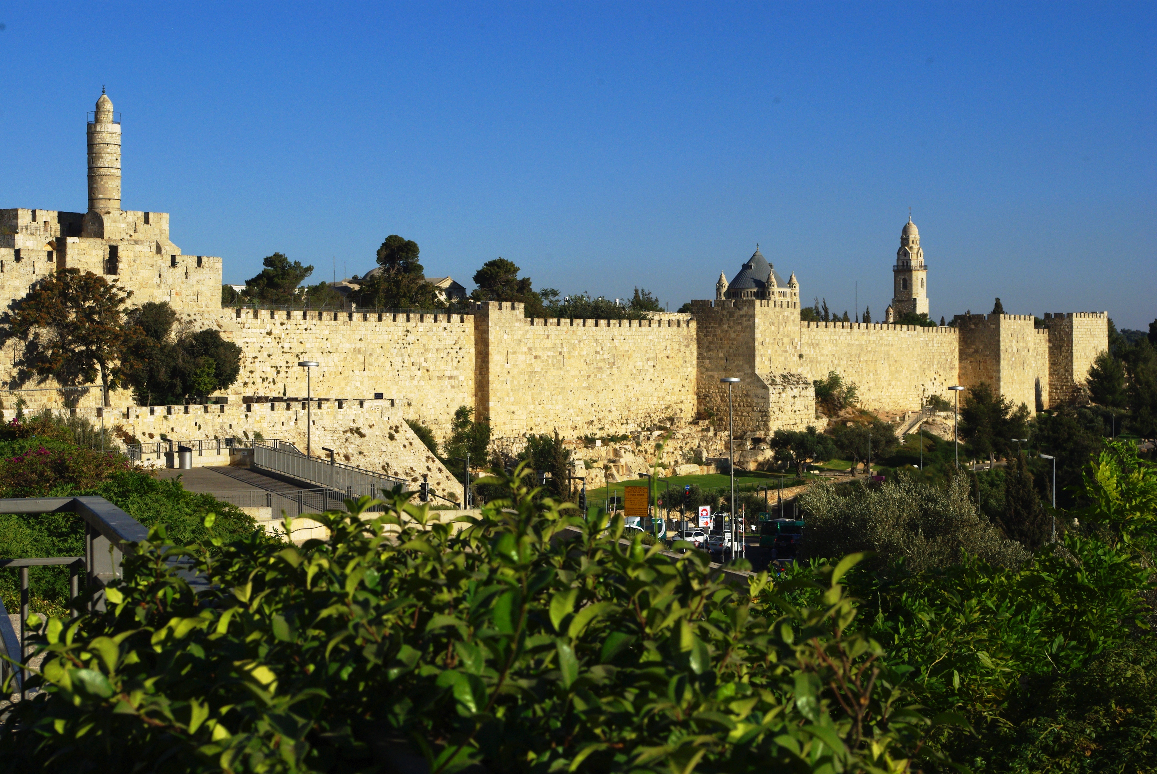 Les murailles de Soliman le Magnifique